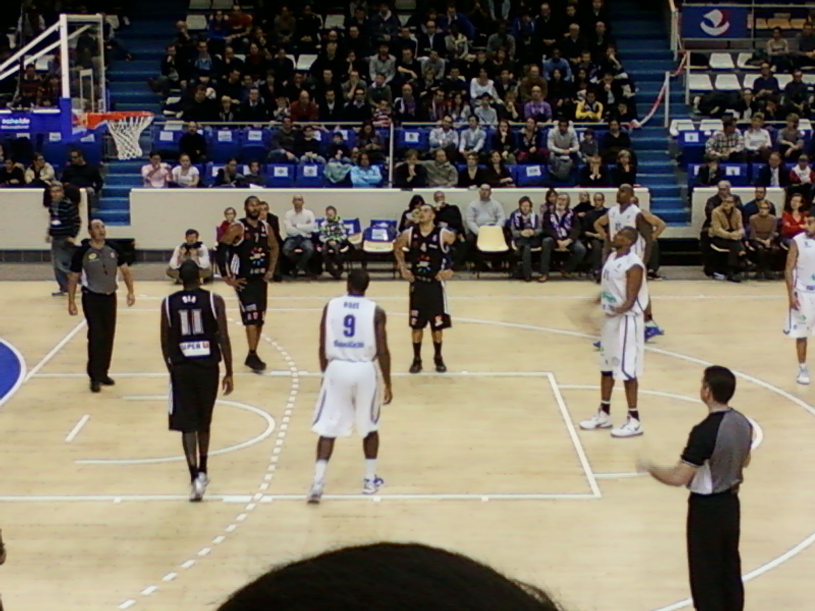 Lamont Hamilton tirant un lancer franc lors du match Paris Levallois - Dijon du 03 décembre 2012 au stade Pierre de Coubertin